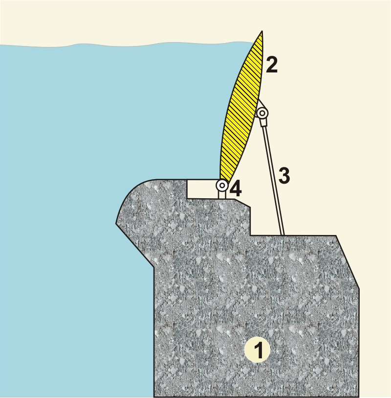 Schematische Darstellung einer Fischbauchklappe